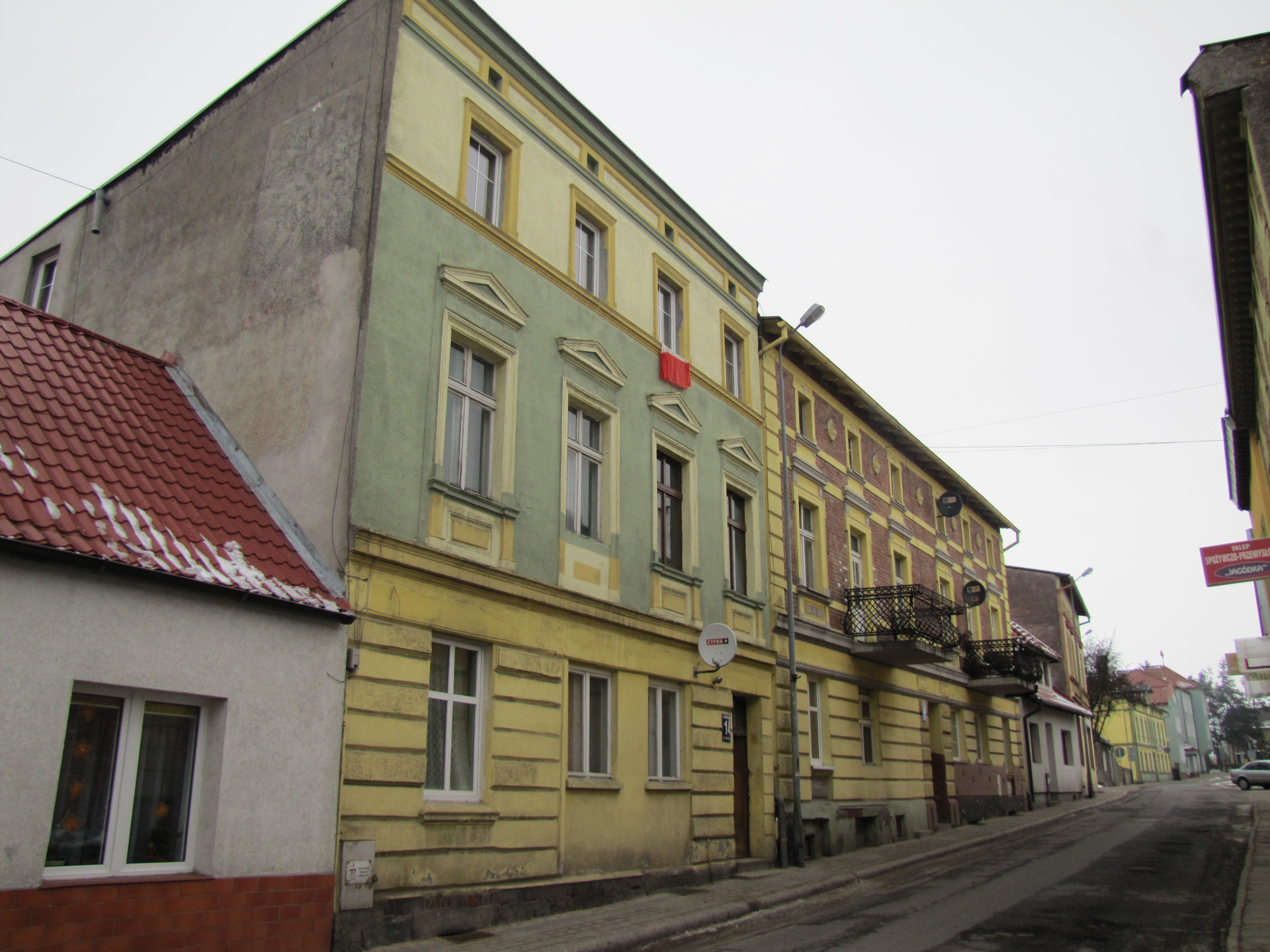 Kamienice.